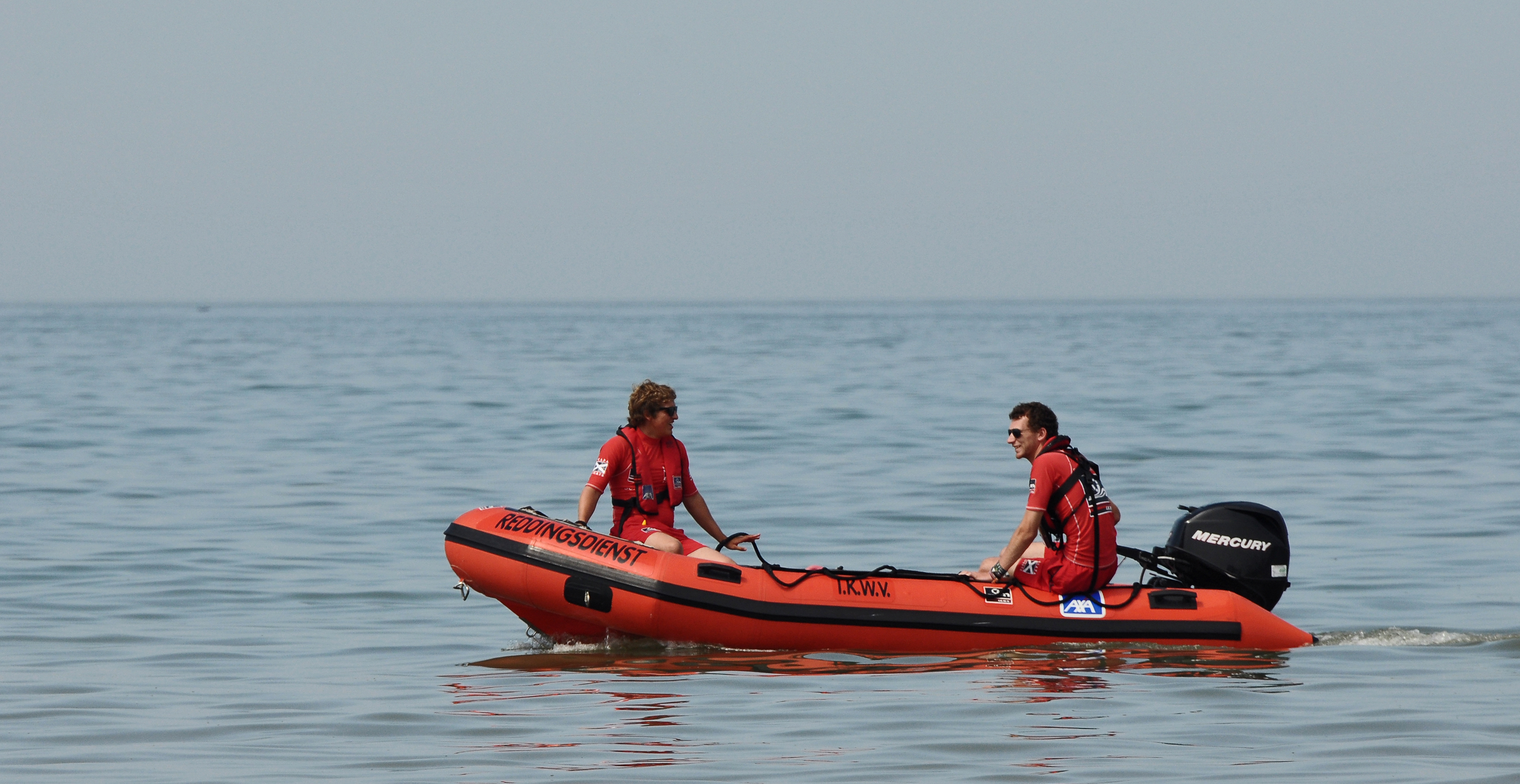 redders in boot